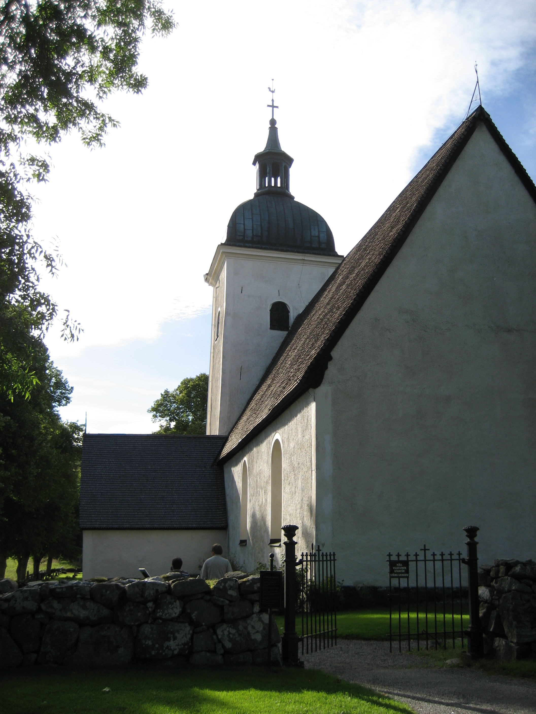 Grödinge kyrka i Botkyrka kommun.